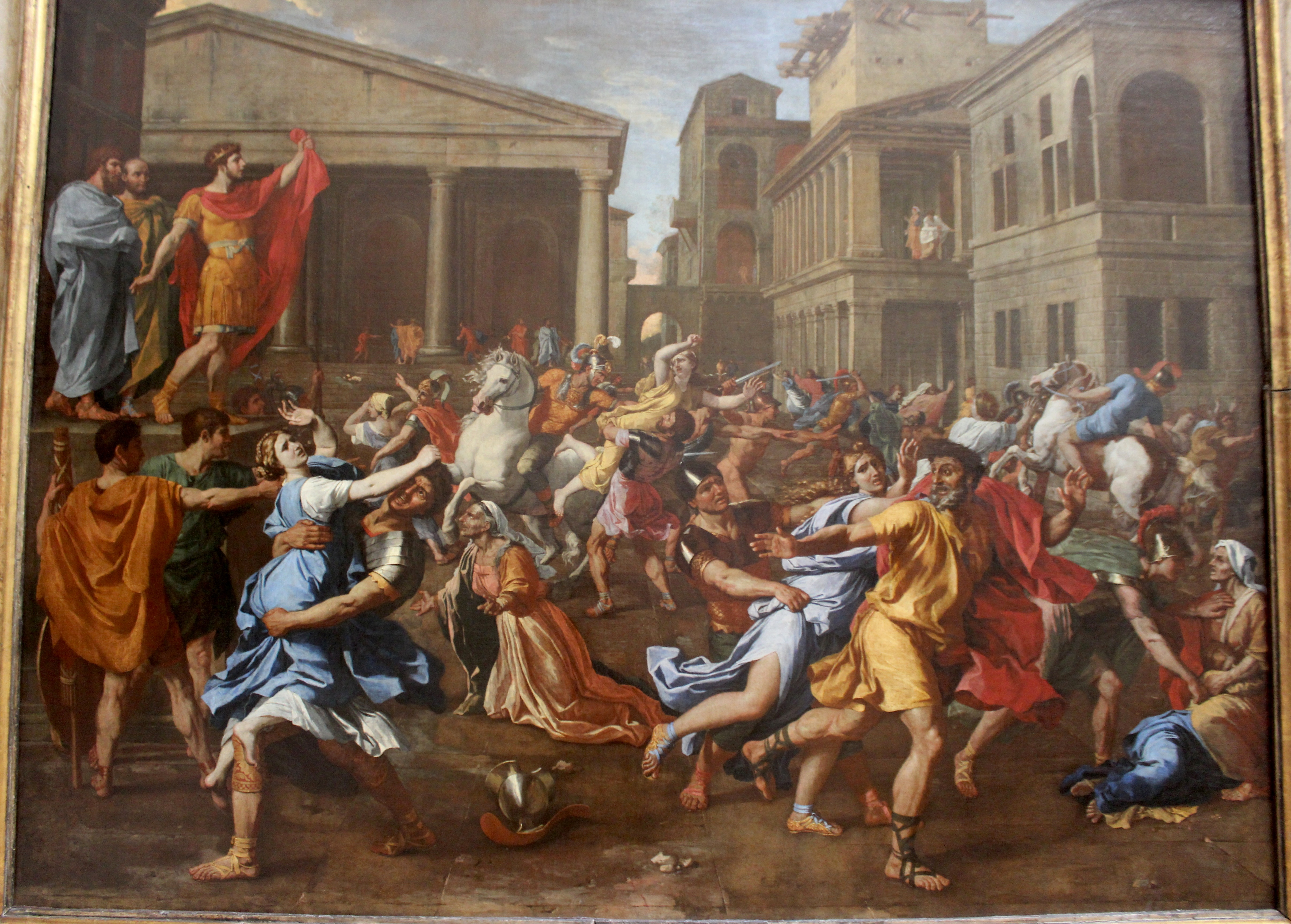 Nicolas Poussin. El rapto de las Sabinas. Louvre.